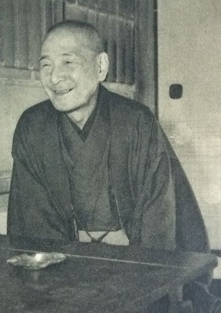 服部伸